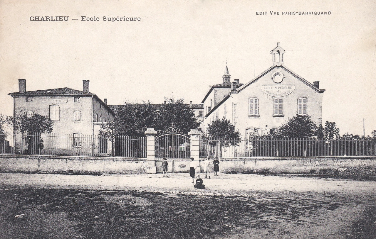 Charlieu (Loire), école supérieure, vers 1905.